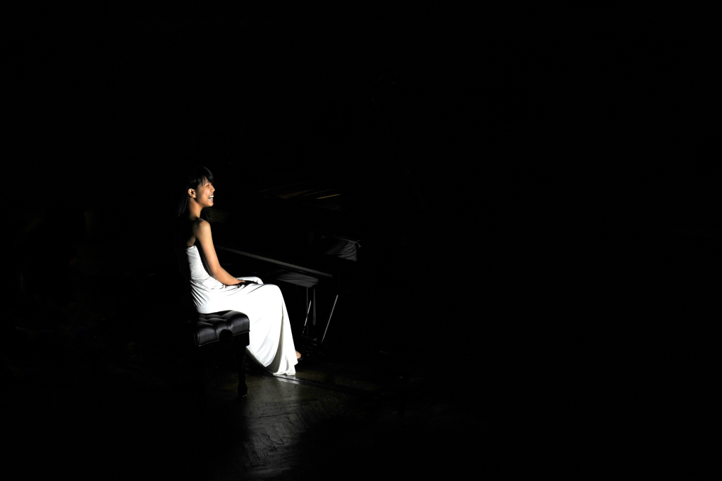 Gala 2o16 - Kate Liu